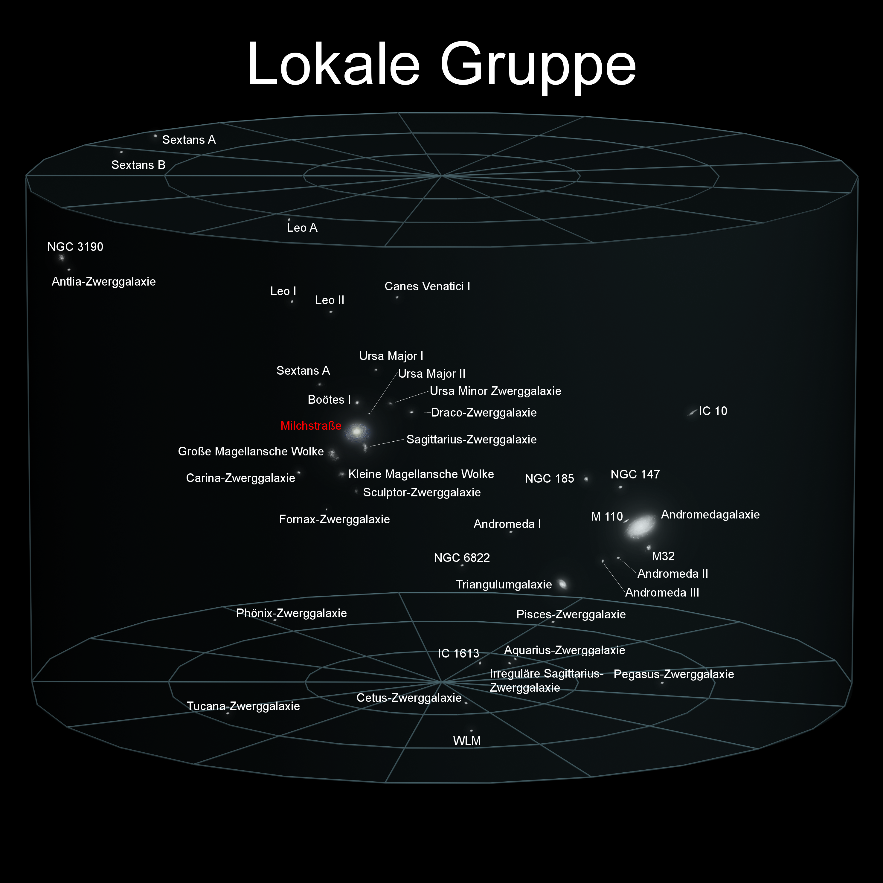 Ausblick ins Universum – Die Lokale Gruppe Ein Mosaik mit allen Bildern findet man hier der Erde im Universum 4x2.png